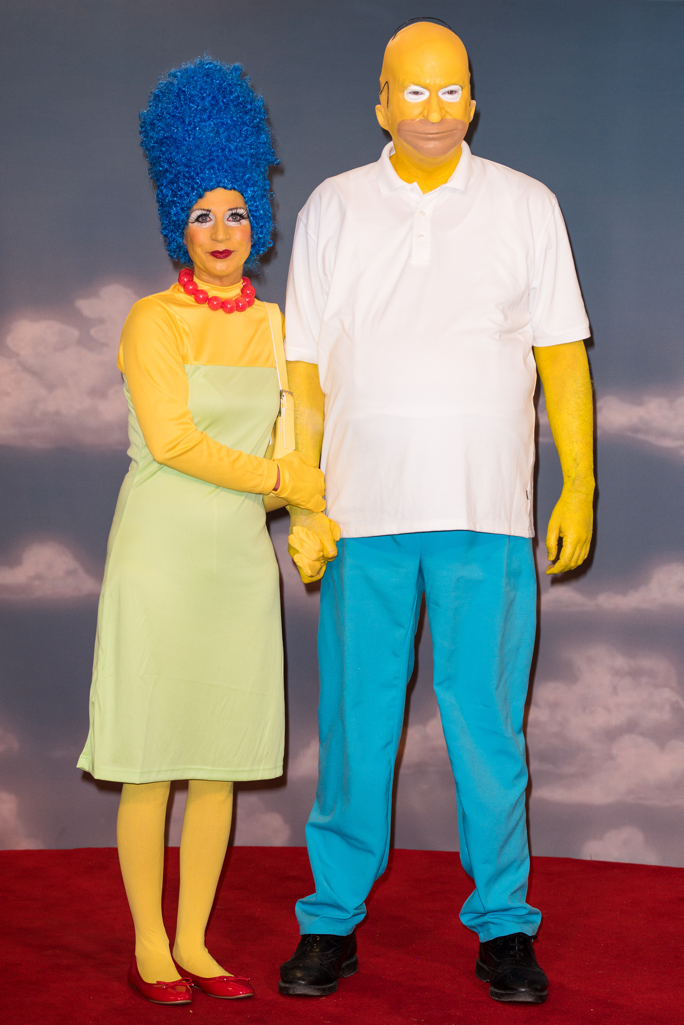 Markus Söder und Frau als Homer und Marge Simpson 2017 bei der Fastnacht in Franken.